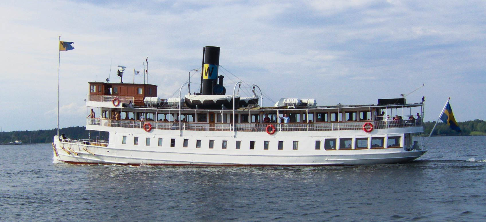 S/s Norrskär ingår i Waxholmsbolagets flotta. The steamer Norrskär in the navy of Waxholmsbolaget.